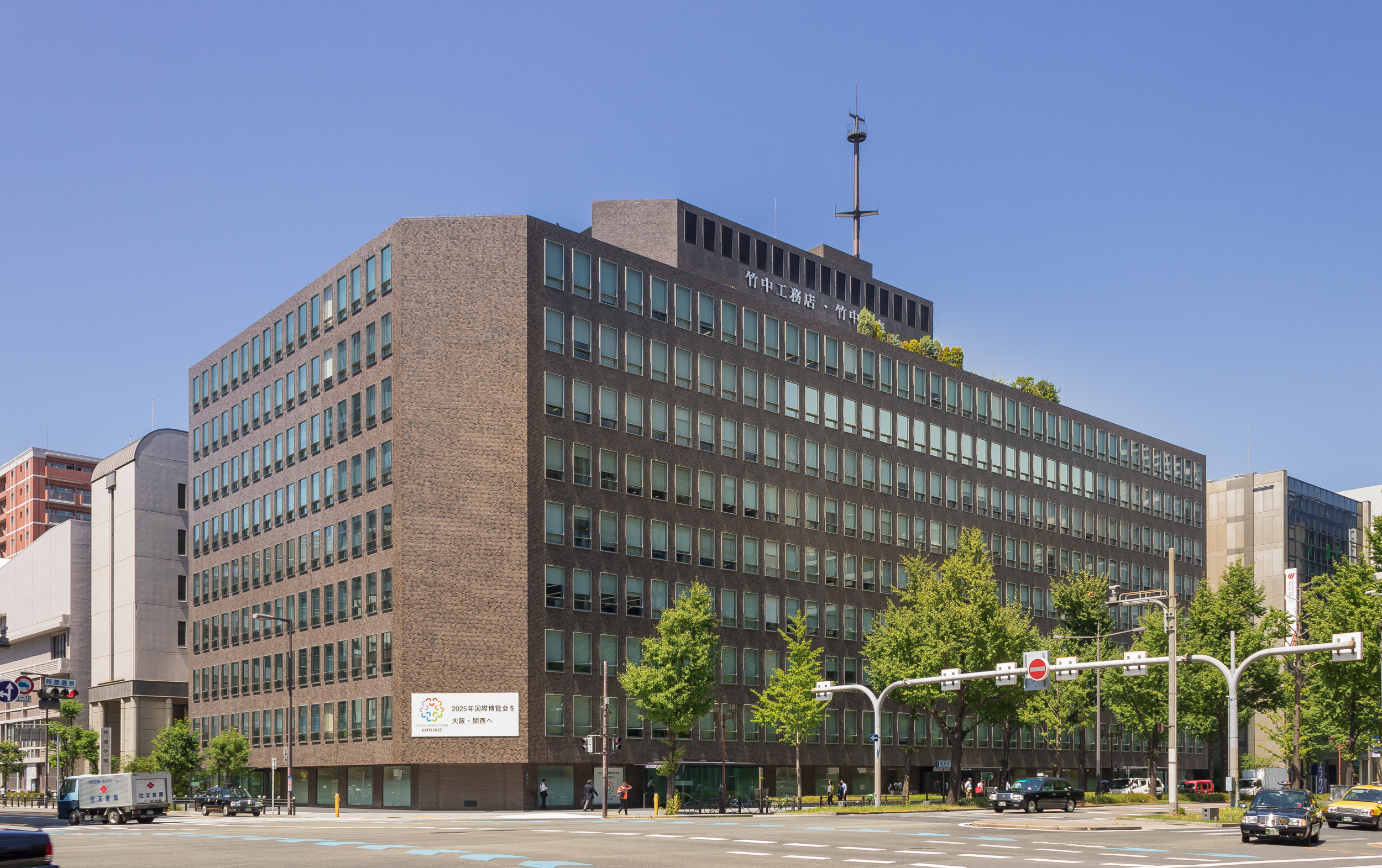 竹中工務店本社